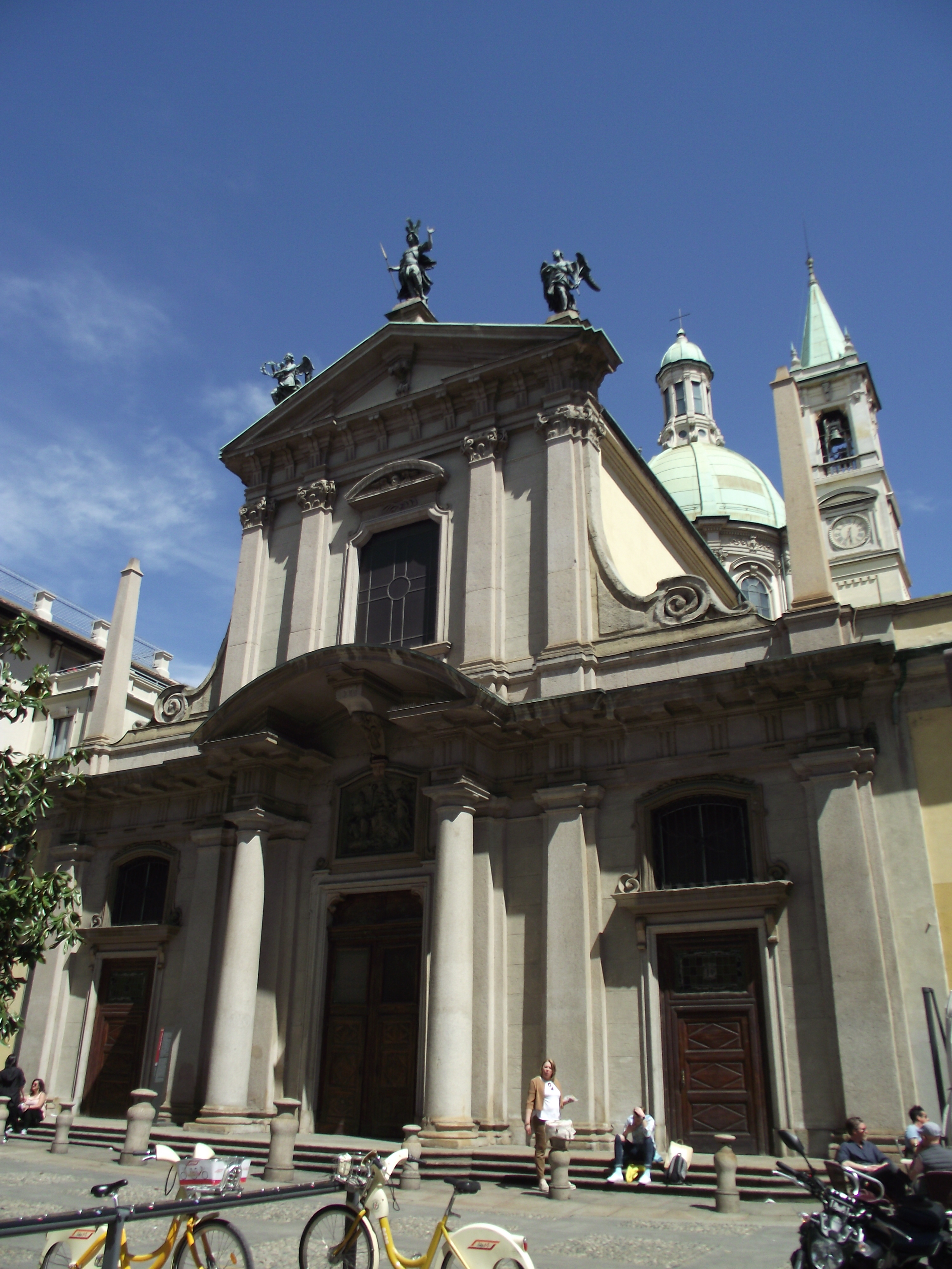 Facciata